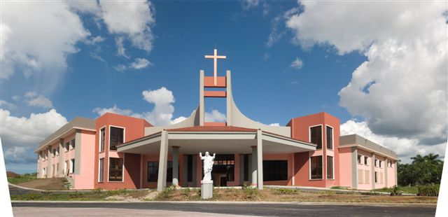 Capilla del Seminario interdiocesano de la Habana: San Carlos y San Ambrosio.